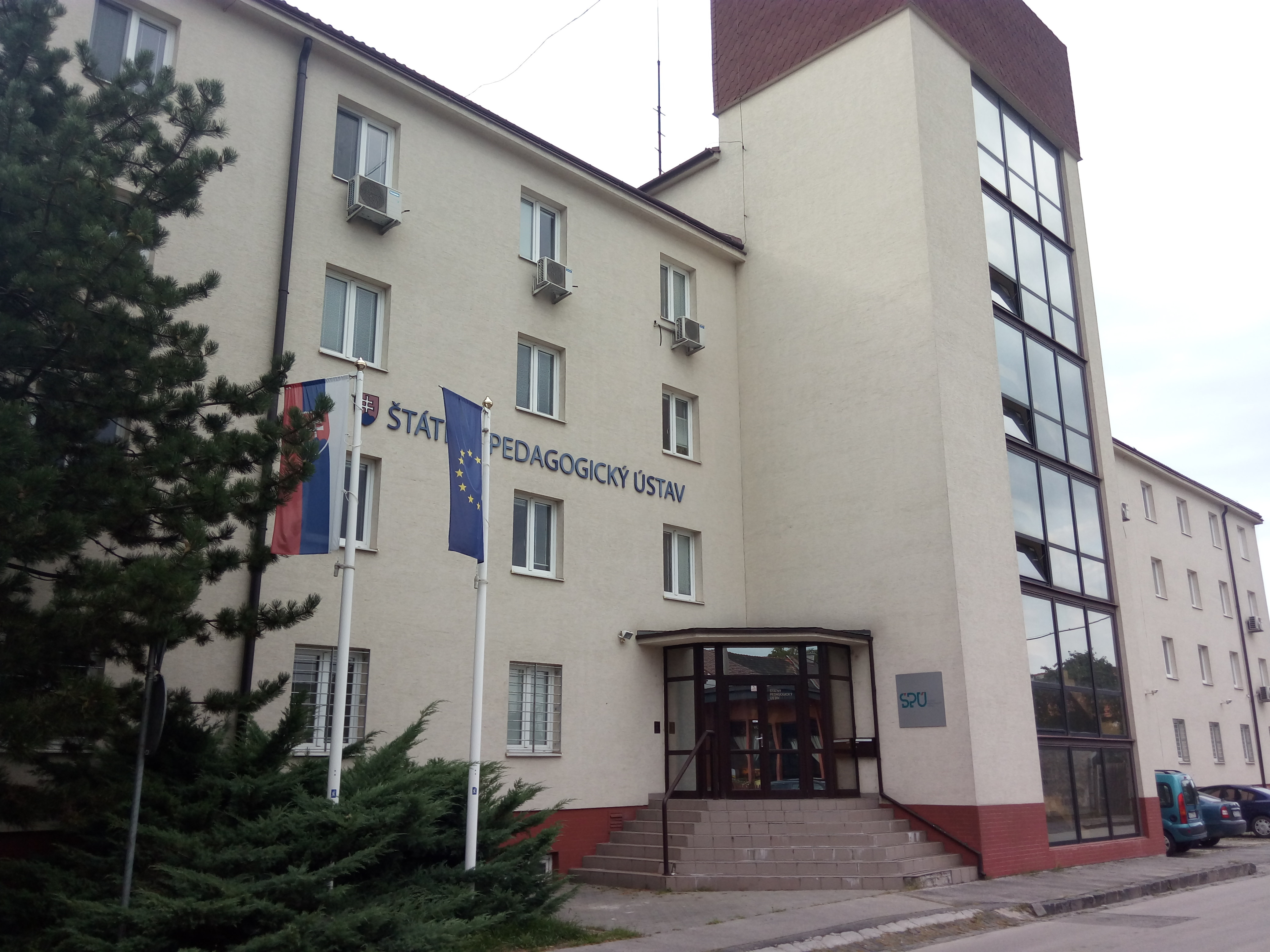 Pluhová 8, Nové Mesto, Bratislava